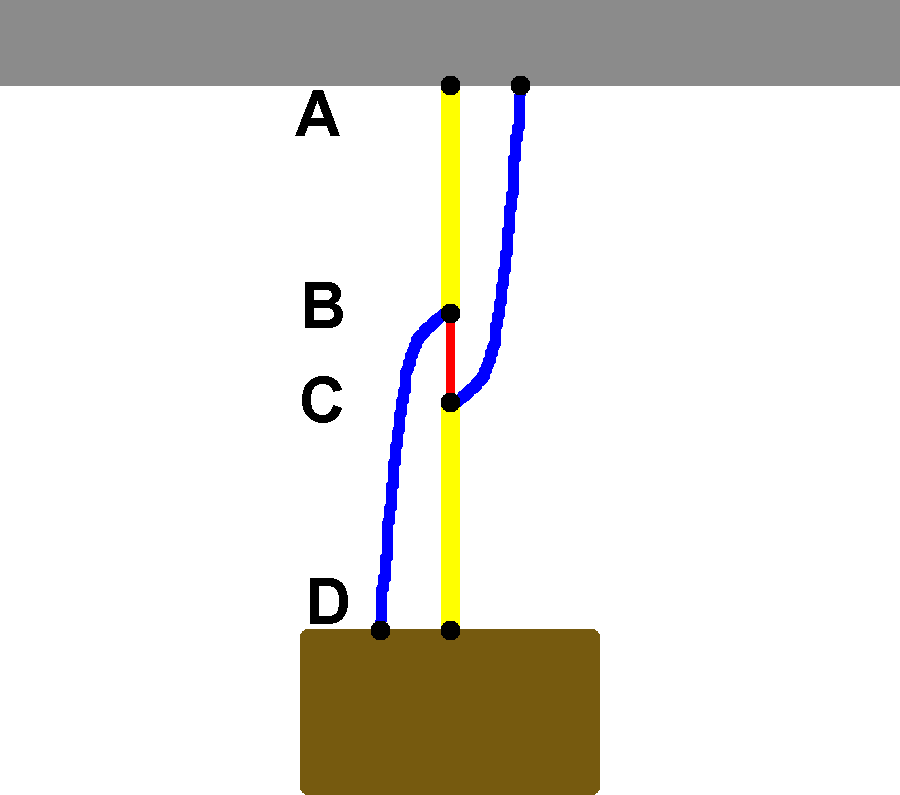 Illustration zum mechanischen Analogon des Braess Paradoxons